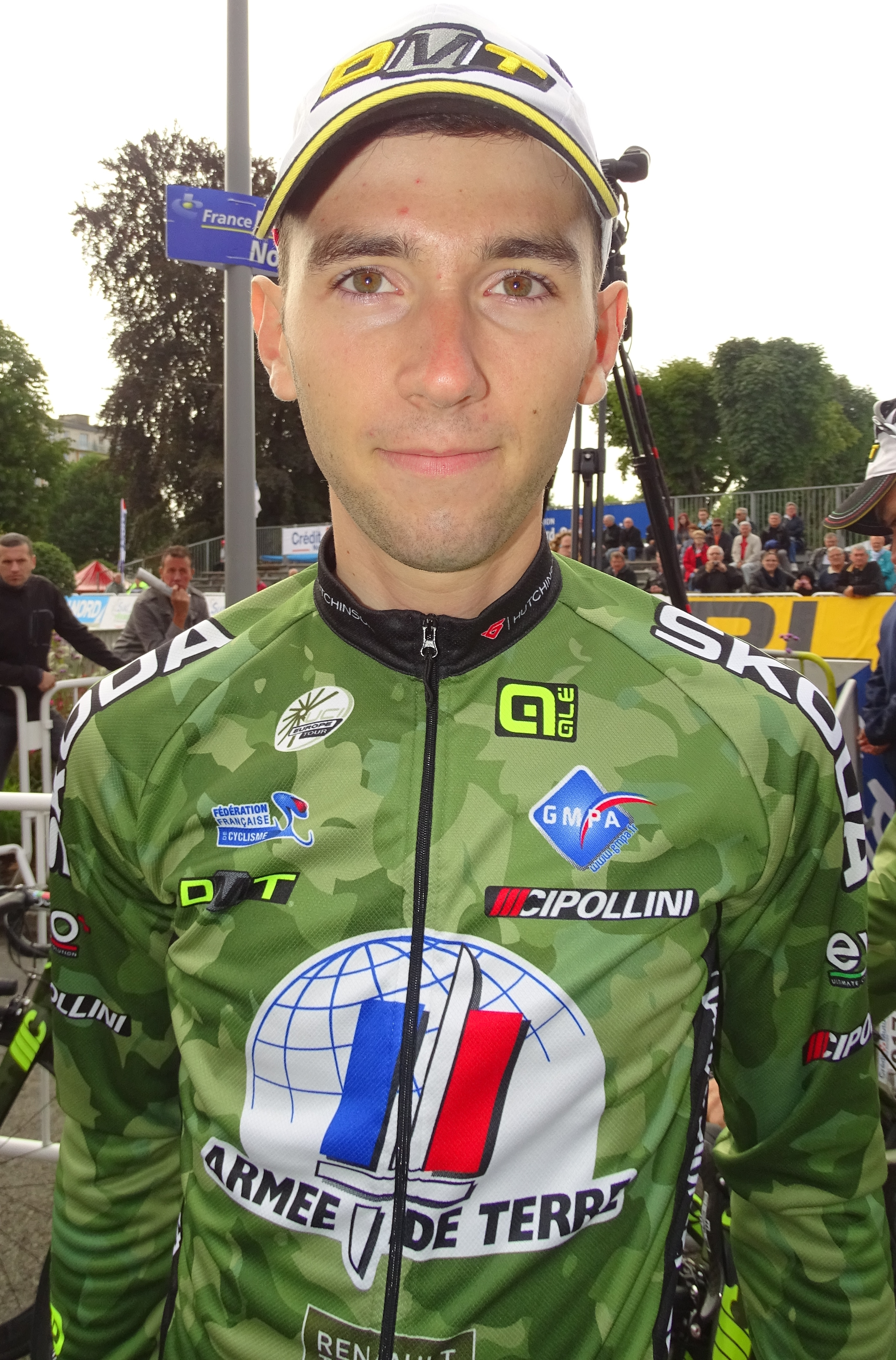 Reportage réalisé le dimanche 6 septembre à l'occasion du départ et de l'arrivée du Grand Prix de Fourmies 2015 à Fourmies, Nord-Pas-de-Calais, France.